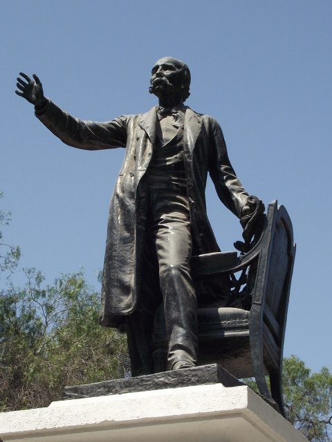 Monumento a Manuel Antonio Matta en la avenida del mismo nombre en Copiapó, Chile.